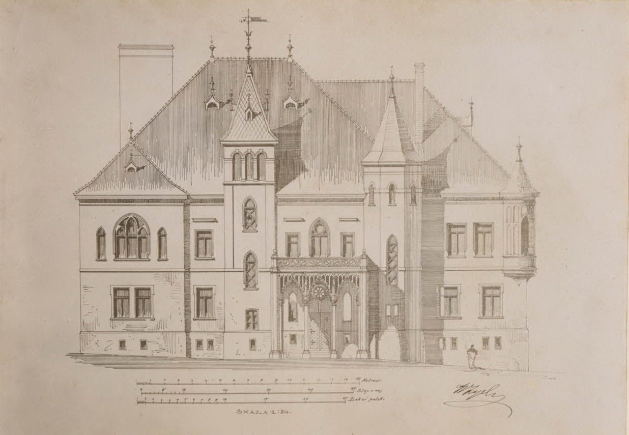 Беларуская (тарашкевіца): Бераставіца Вялікая (Bierastavica Vialikaja), сядзіба Касакоўскіх (Kasakoŭski)